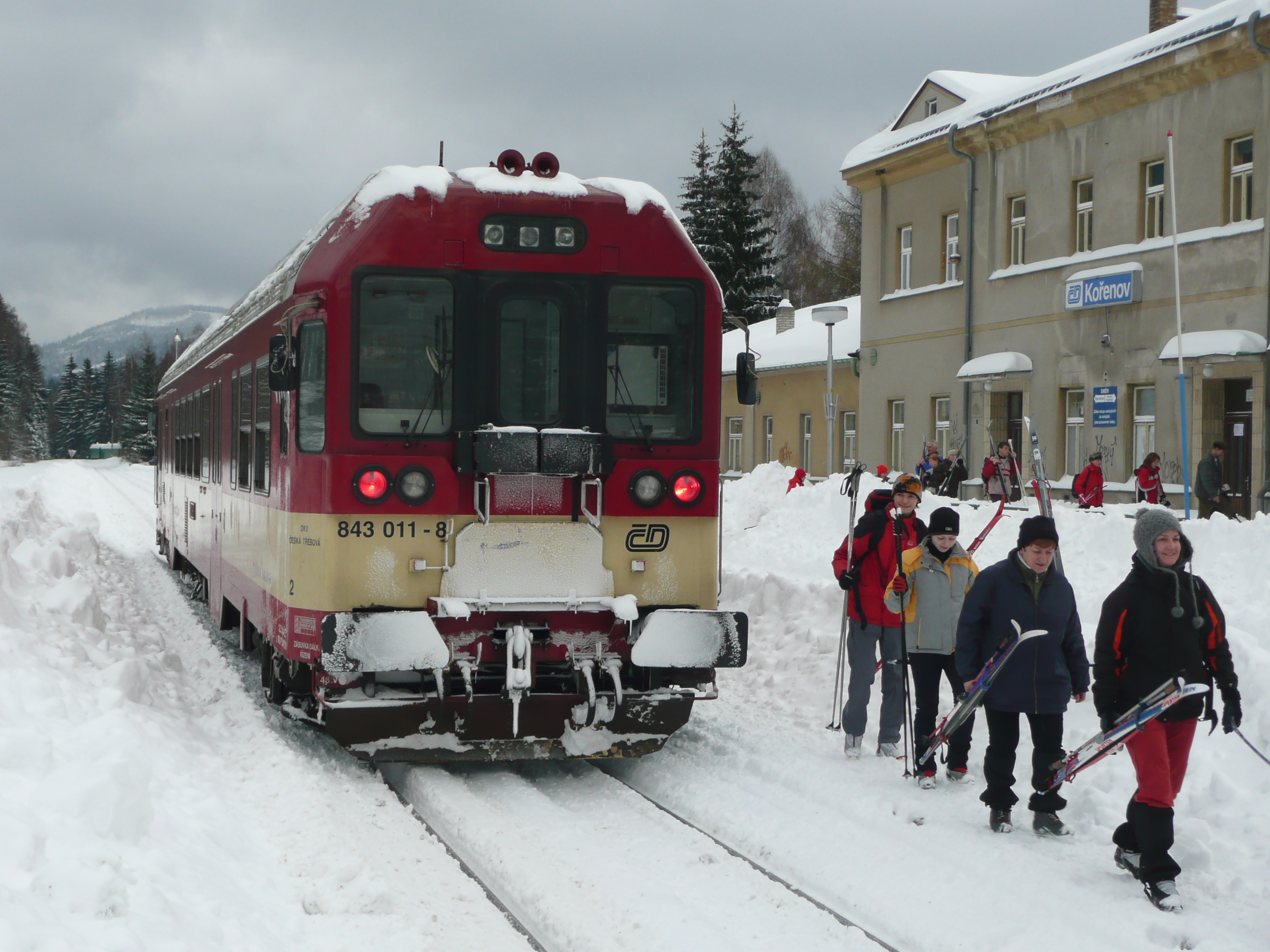 Regionalbahn nach Harrachov in Korenov im Januar 2010